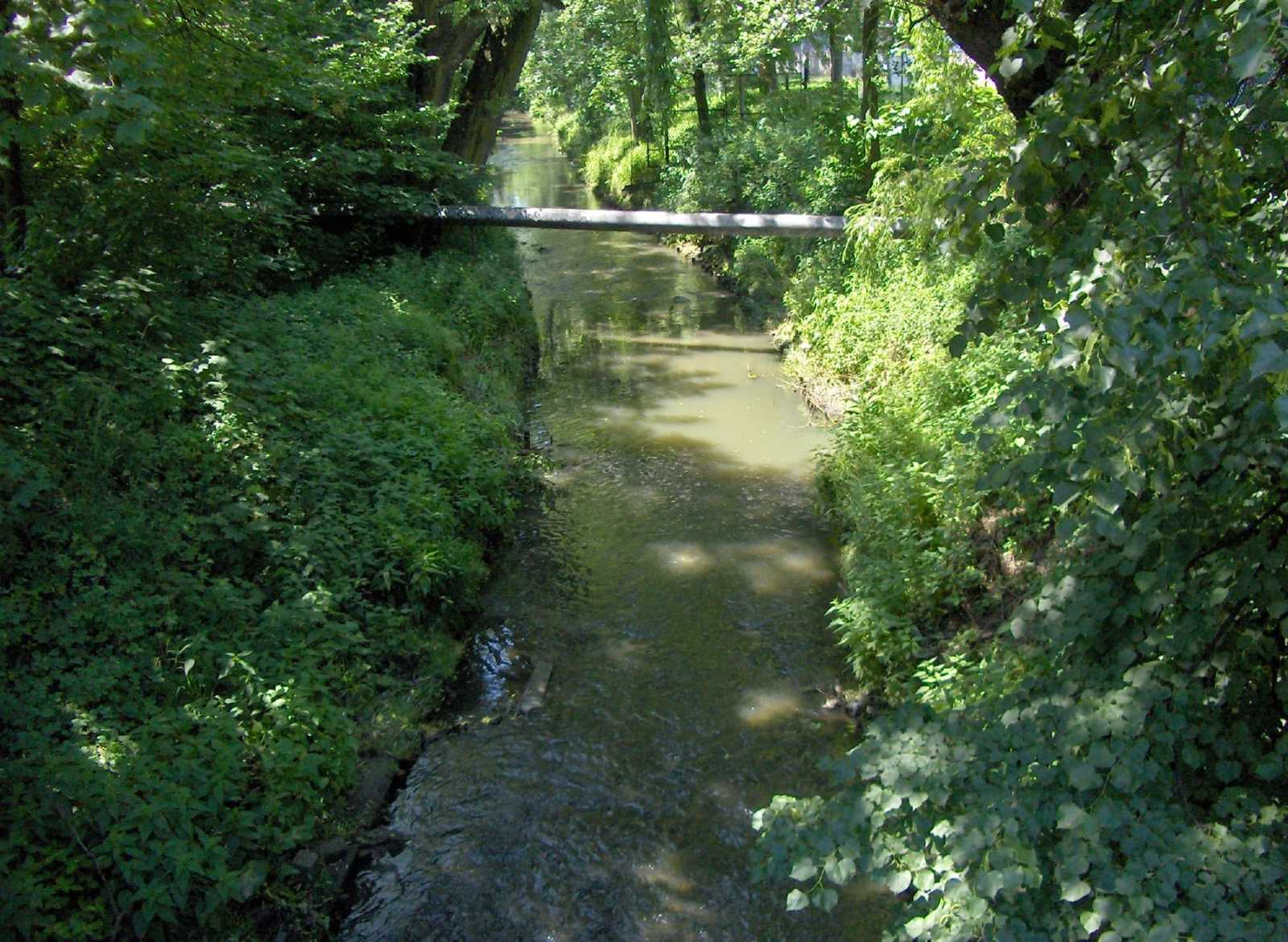 Leśnica w Wodzisławiu Śląskim.